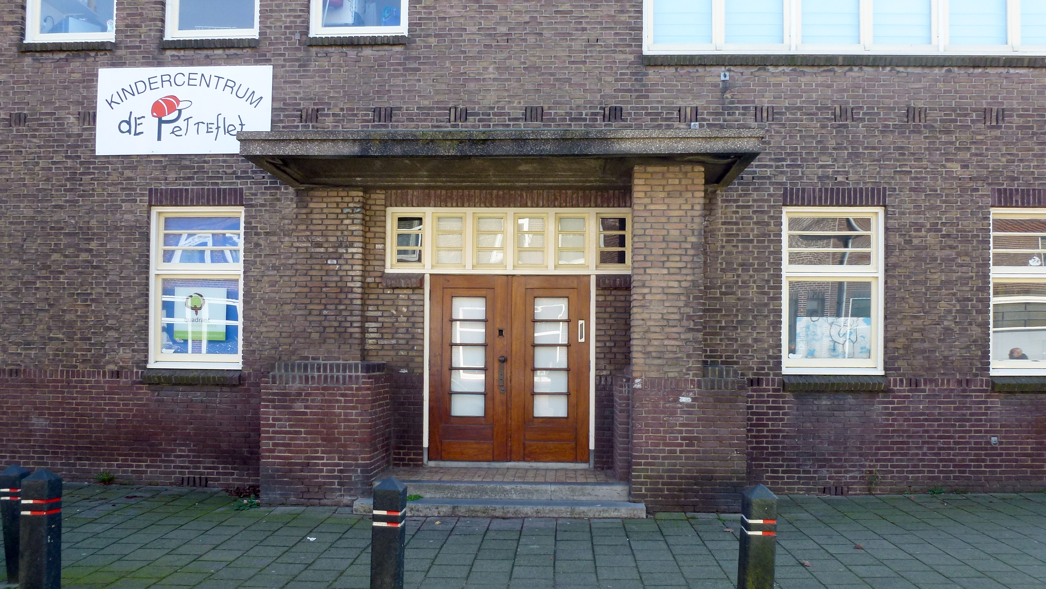 Voormalige bewaarschool uit 1901 in Gouda van architect C.J.W. Dessing